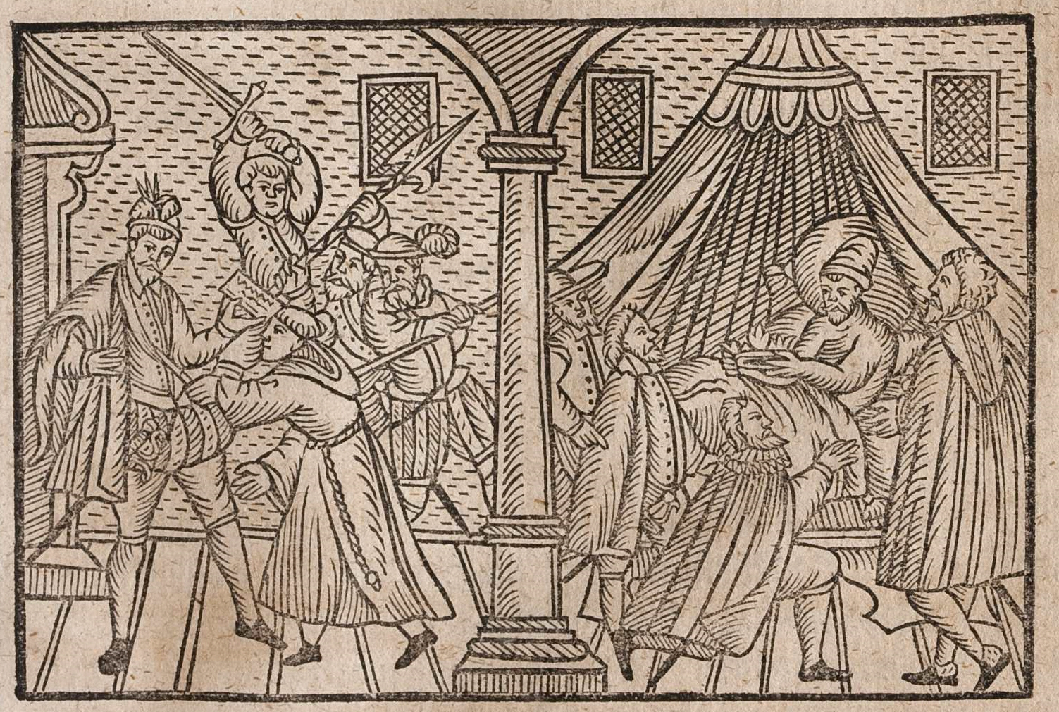 Tod Heinrich III. von Frankreich; Titelillustration zu: Discovrs : Warhafftige Erzehlung/ wie Heinricus 3. König in Franckreich/ von einem PredigerMünch/ Jacob Clemens genandt/ zu S. Claud/ den 1. Tag deß Augstmons/ An. [et]c. 89. mit einem vergifften Federmesserlein erstochen worden ; Jtem ein Brieff meh.../ vnnd durch den Druck ausgesprengt haben, s. l. 1589